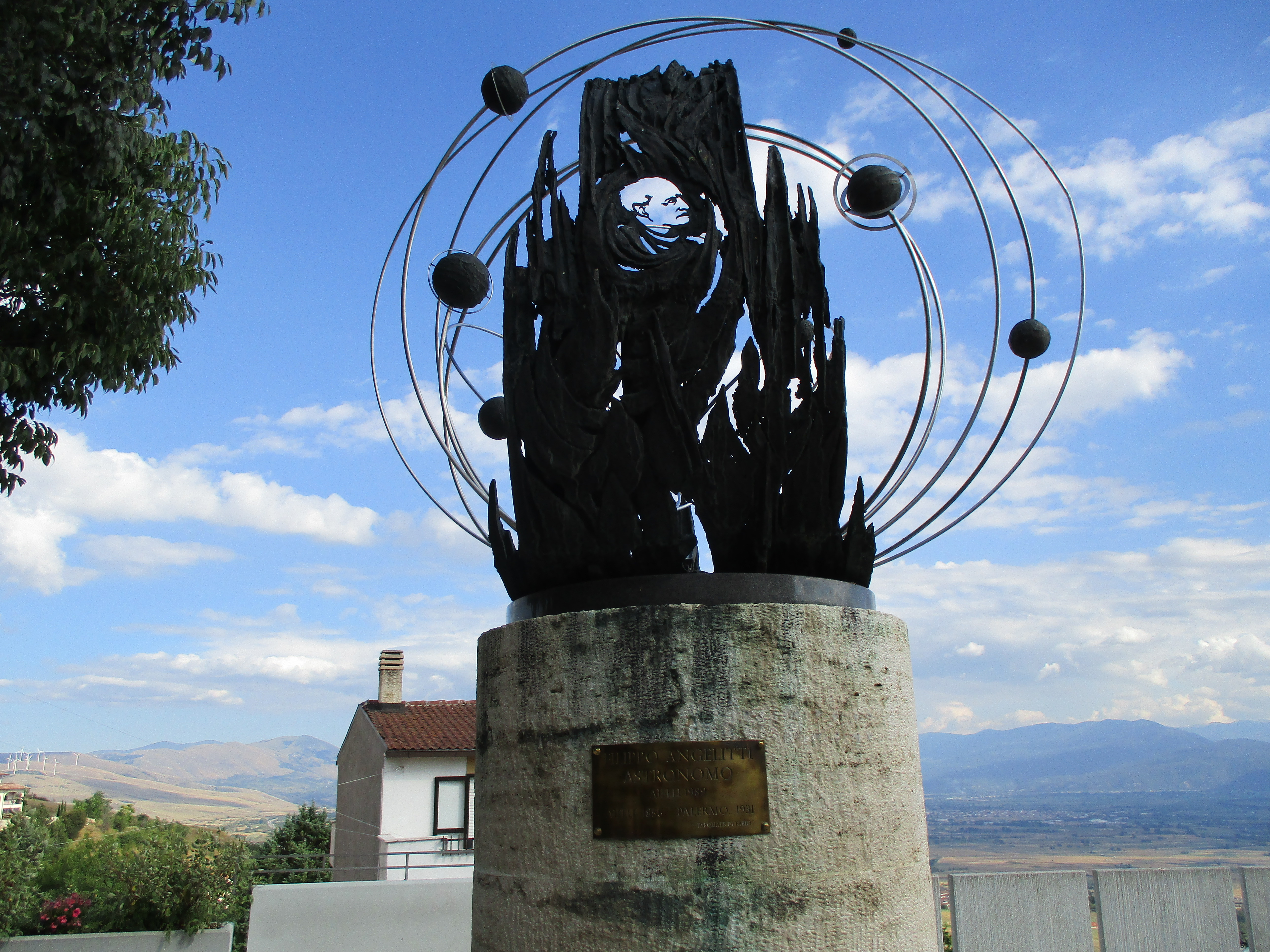 Monumento Filippo Angelitti (opera Pasquale Di Fabio)